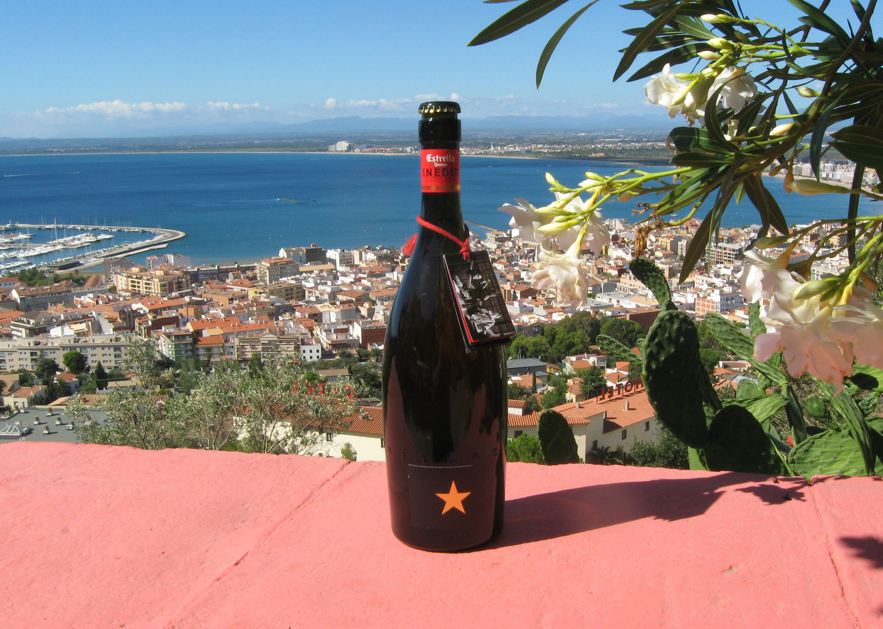 Im Jahre 2009 in Zusammenarbeit mit 3-Sterne Koch Ferran Adrià kreierte Biermarke "Inedit" der spanischen Brauerei Estrella Damm Datum: 10.09.2010 Urheber: Michael Pfeiffer alias Benutzer:Gordito1869 Quelle: privates Fotoarchiv des Urhebers Ort der Aufnahme: Bucht von Roses (Katalonien)